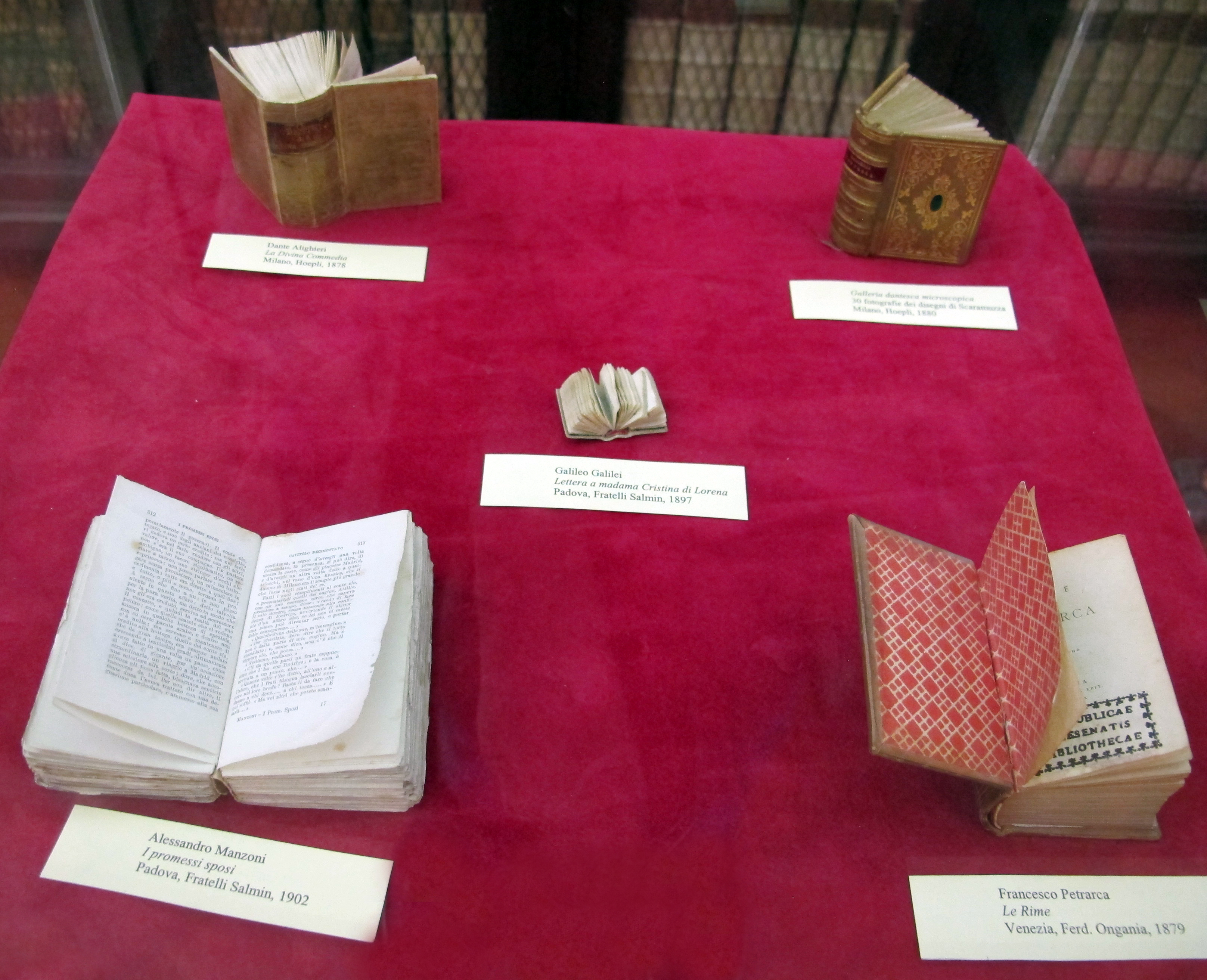 Biblioteca Malatestiana - MIBAC This is a photo of a monument which is part of cultural heritage of Italy.